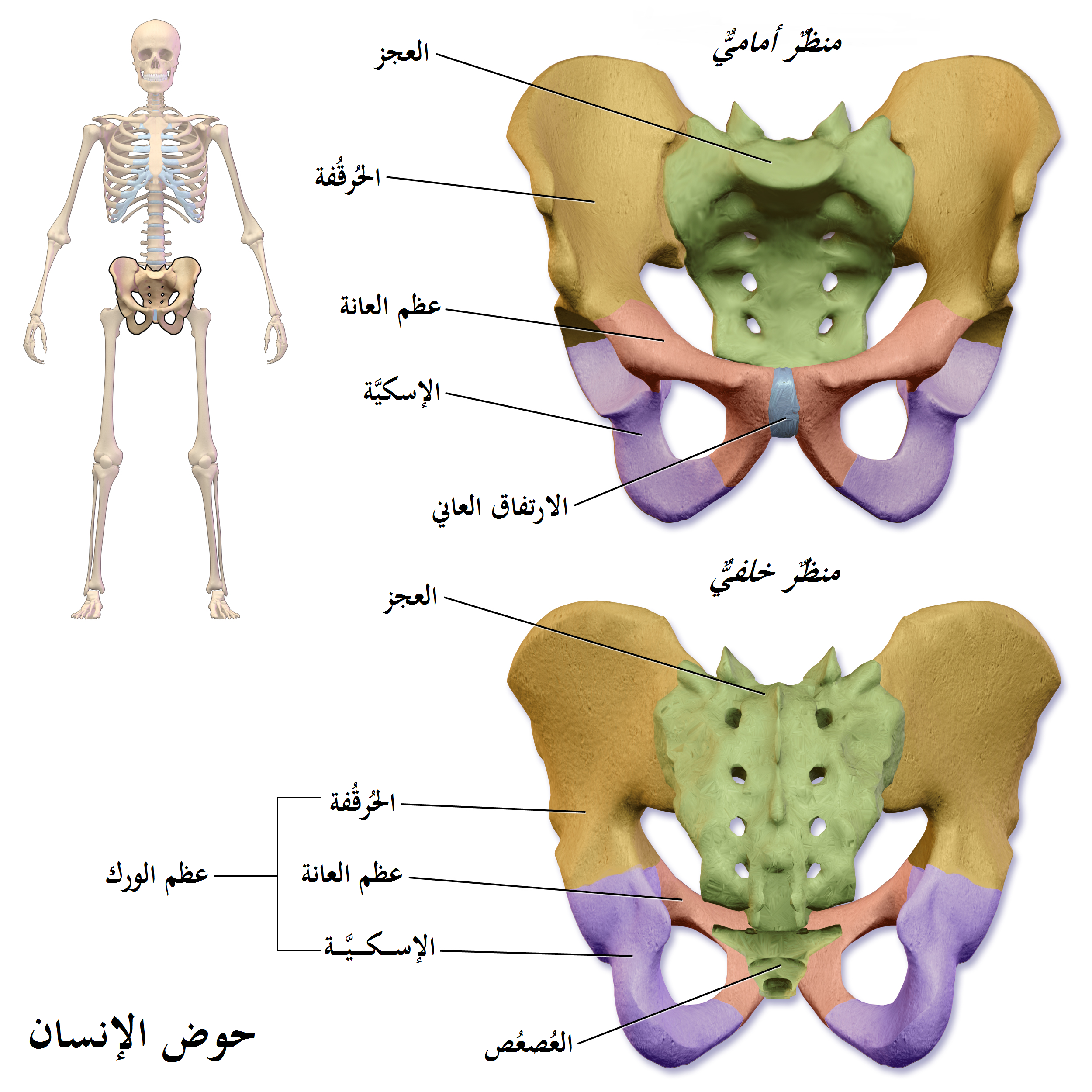 حوض الإنسان. انظر مقطعًا مُصورًا كاملًا عن هذا الموضوع الطبي.